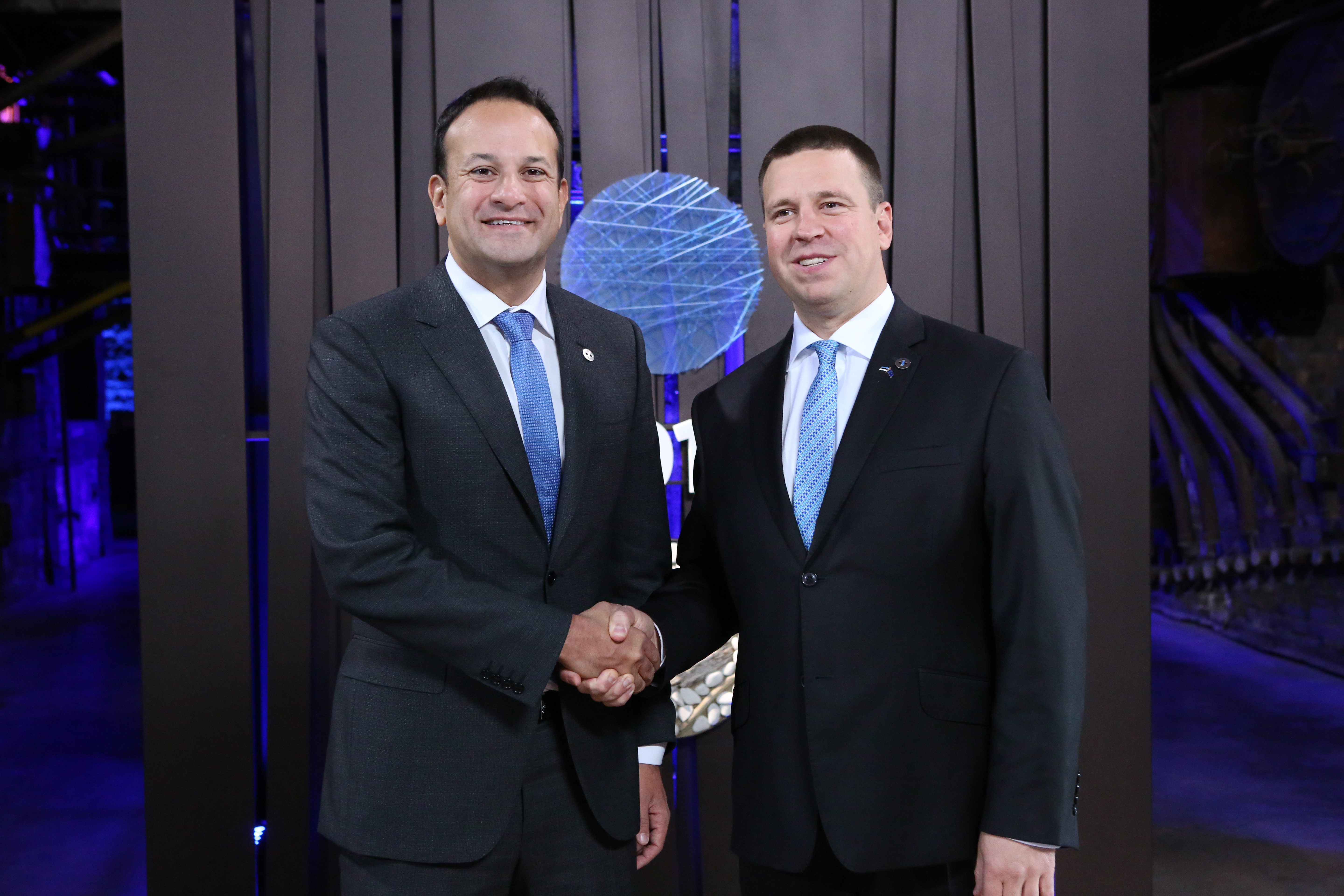 (l-r) Leo Varadkar, Taoiseach, Ireland; Jüri Ratas, Prime Minister, Estonia Photo: Annika Haas (EU2017EE)